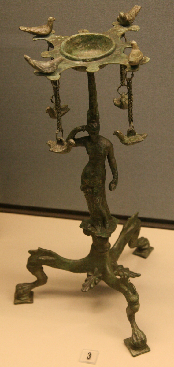 Bronzen Etruskische wierookbrander, APM 11.864. Ca. 550-450 v. Chr. Vier duifjes vliegen rond het hoofd van de halfnaakte liefdesgodin Turan (vergelijkbaar met Aphrodite). Op de rand van het wierookbekken staat een korte inscriptie die aangeeft dat het voorwerp voor het graf van een vrouw met de naam Ramthu Tepia bestemd was. Bronzen Etruskische wierookbrander, APM 11.864. Ca. 550-450 v. Chr. Vier duifjes vliegen rond het hoofd van de halfnaakte liefdesgodin Turan (vergelijkbaar met Aphrodite). Op de rand van het wierookbekken staat een korte inscriptie die aangeeft dat het voorwerp voor het graf van een vrouw met de naam Ramthu Tepia bestemd was.